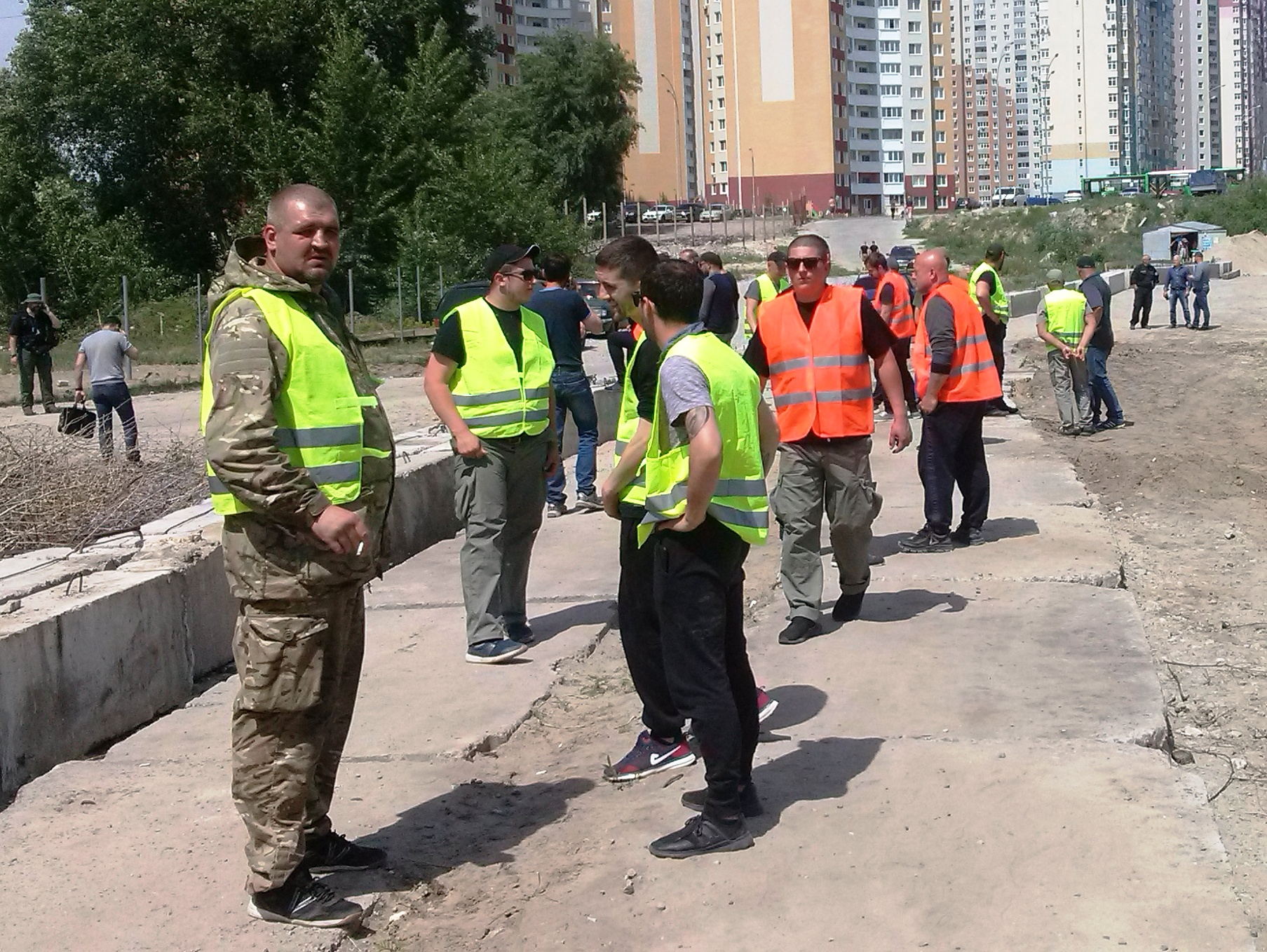 Титушки в опознавательных жилетах